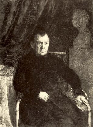 Павел Воинович Нащокин. Рисунок Э. А. Дмитриева-Мамонова. Сепия, картон прессованный, масло